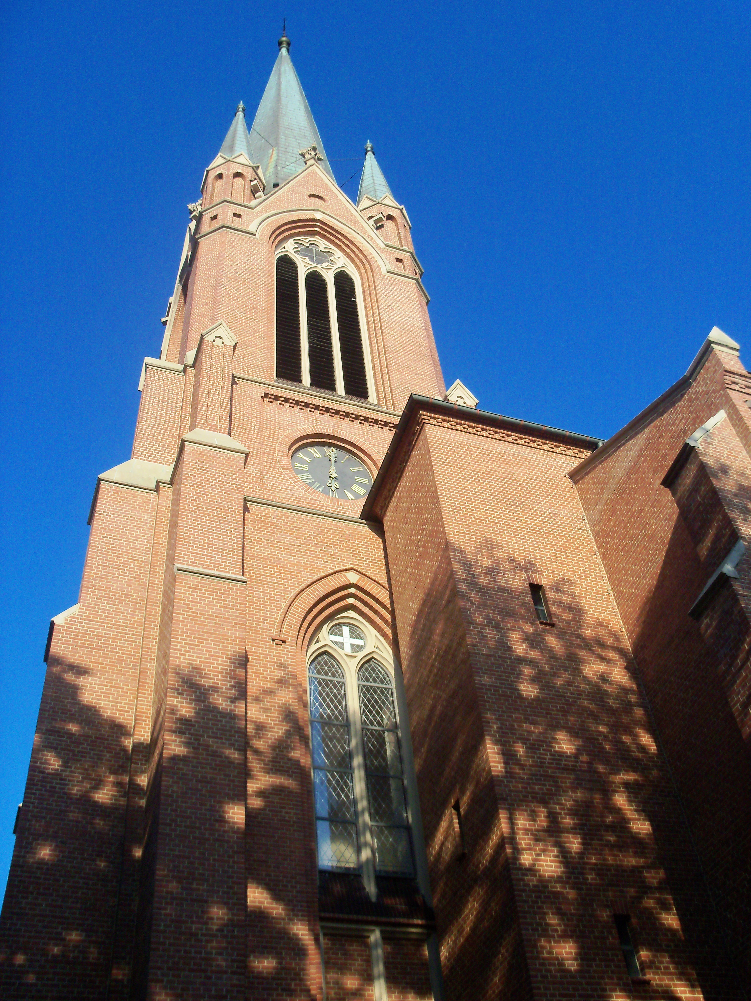 Kościół św. Szczepana w Katowicach-Bogucicach (zabytek nr rejestr. A/1365/88)